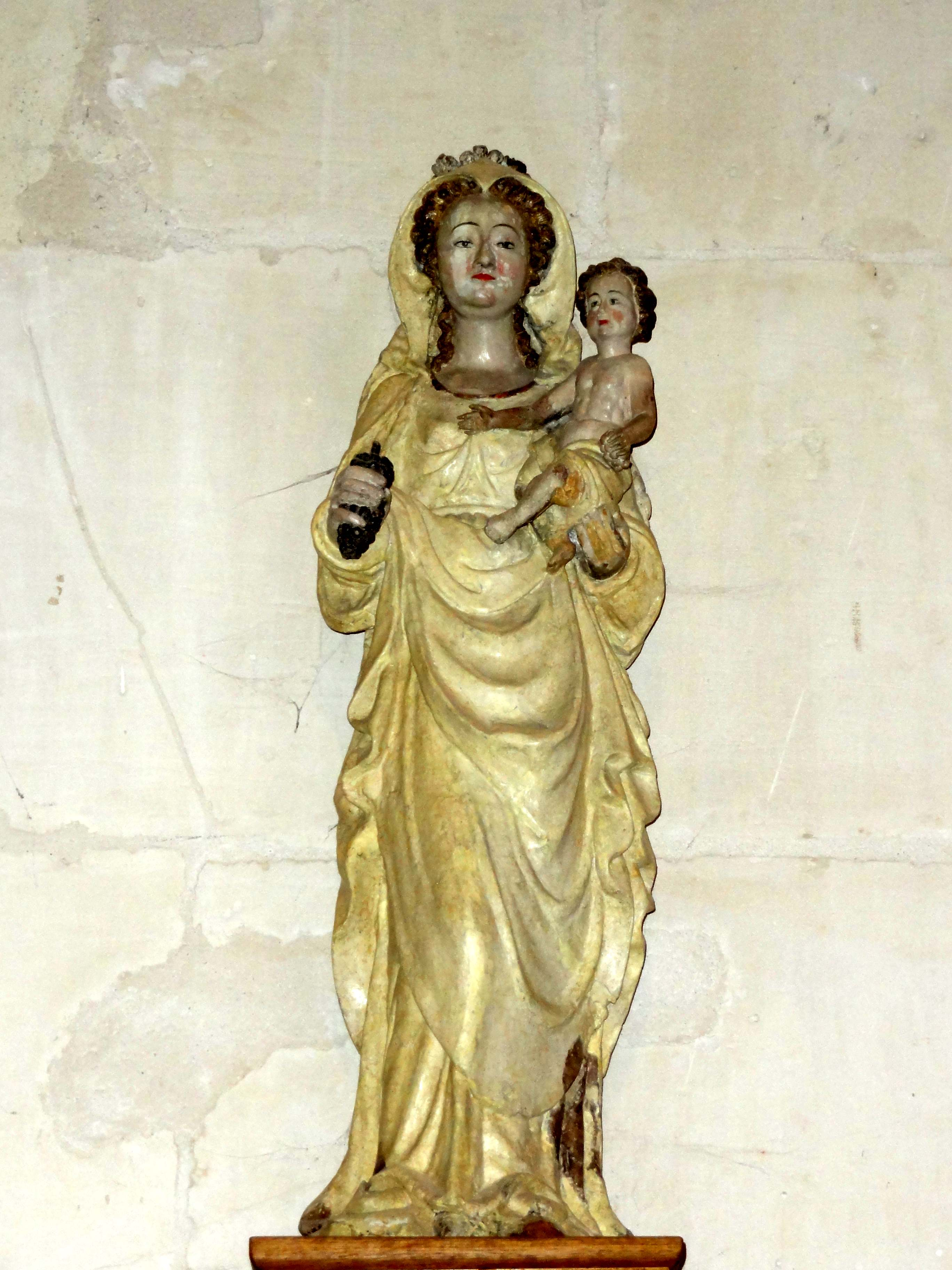 Mobilier de l'église - voir titre.